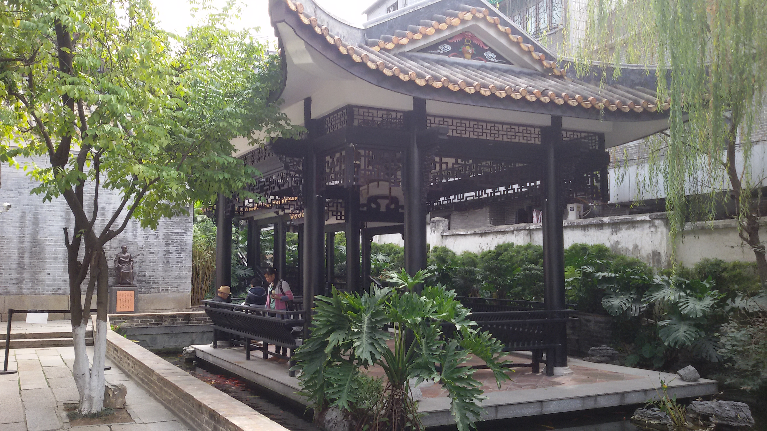 粵語: 十香園紀念館嘅後花園